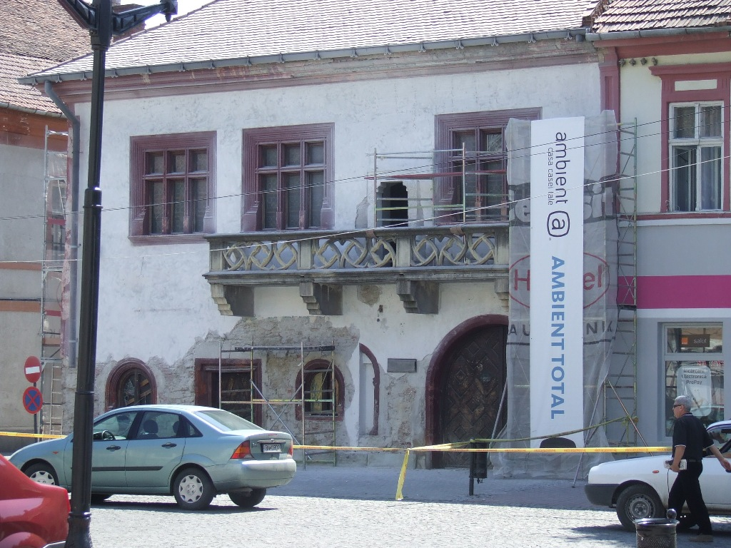 House in Bistriţa city, Bistriţa-Năsăud County, Romania